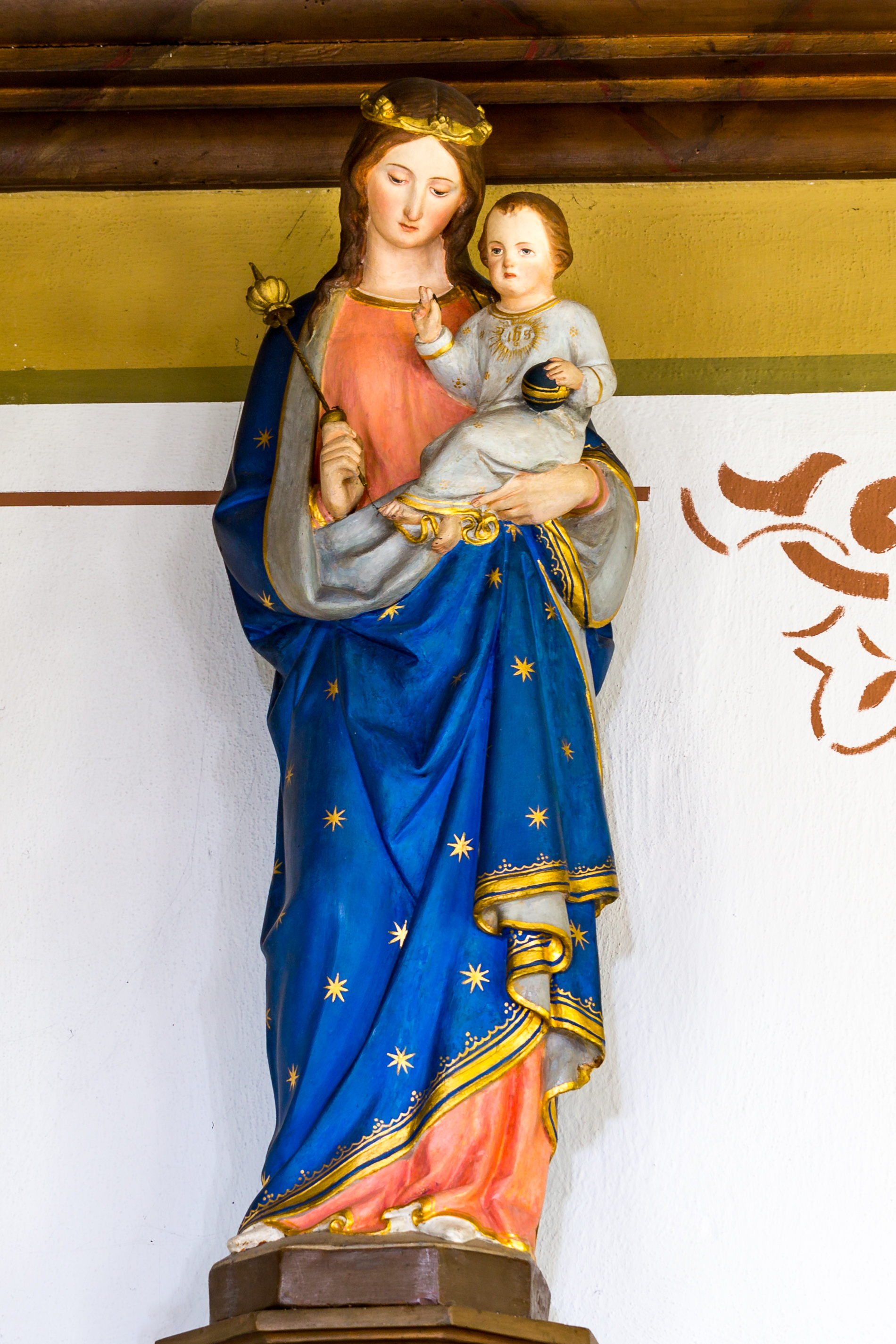 Altkatholische Kirche St. Theresia Nordstrand - Gipsfigur Maria mit Christuskind